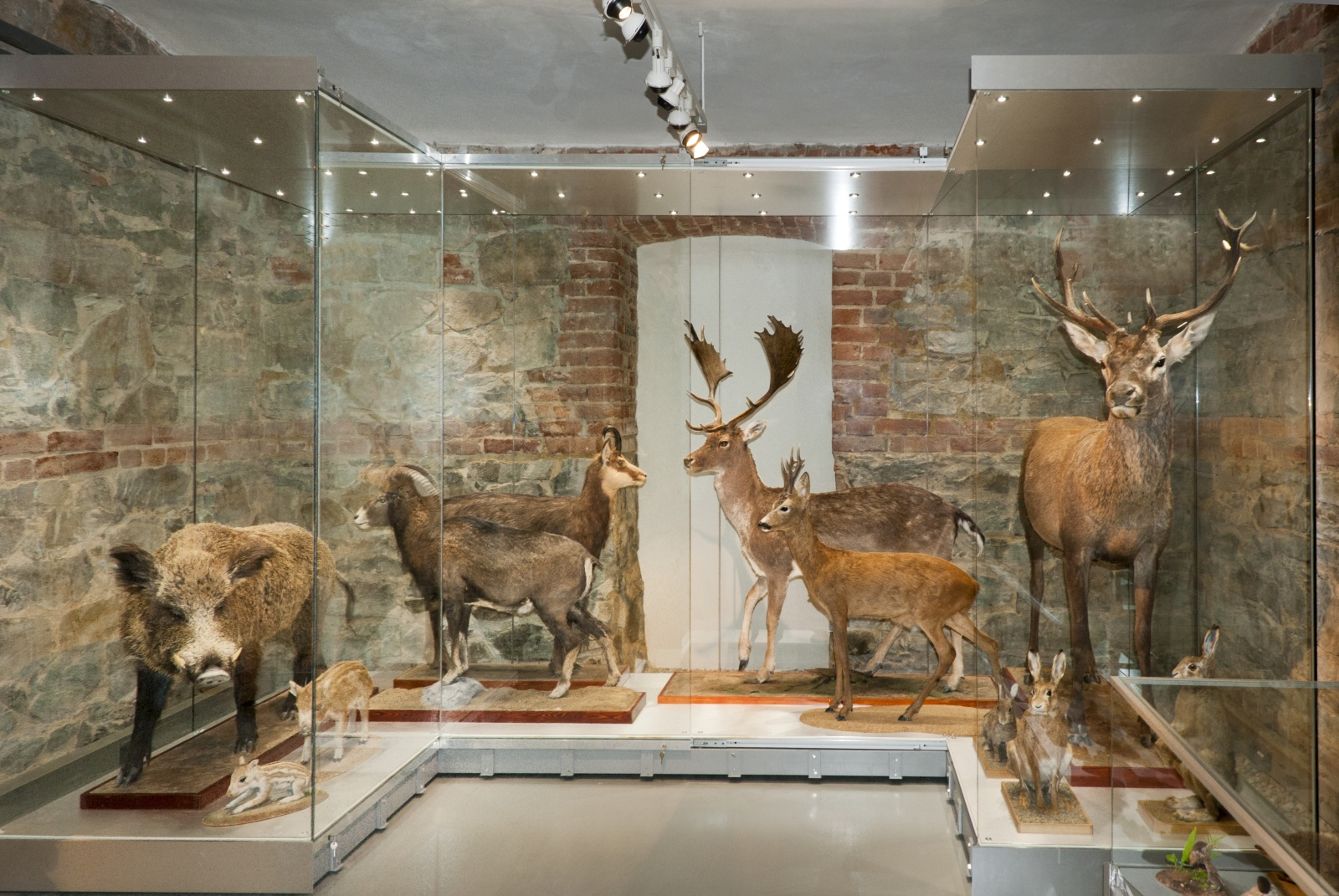 Slezské zemské muzeum - expozice Příroda Slezska